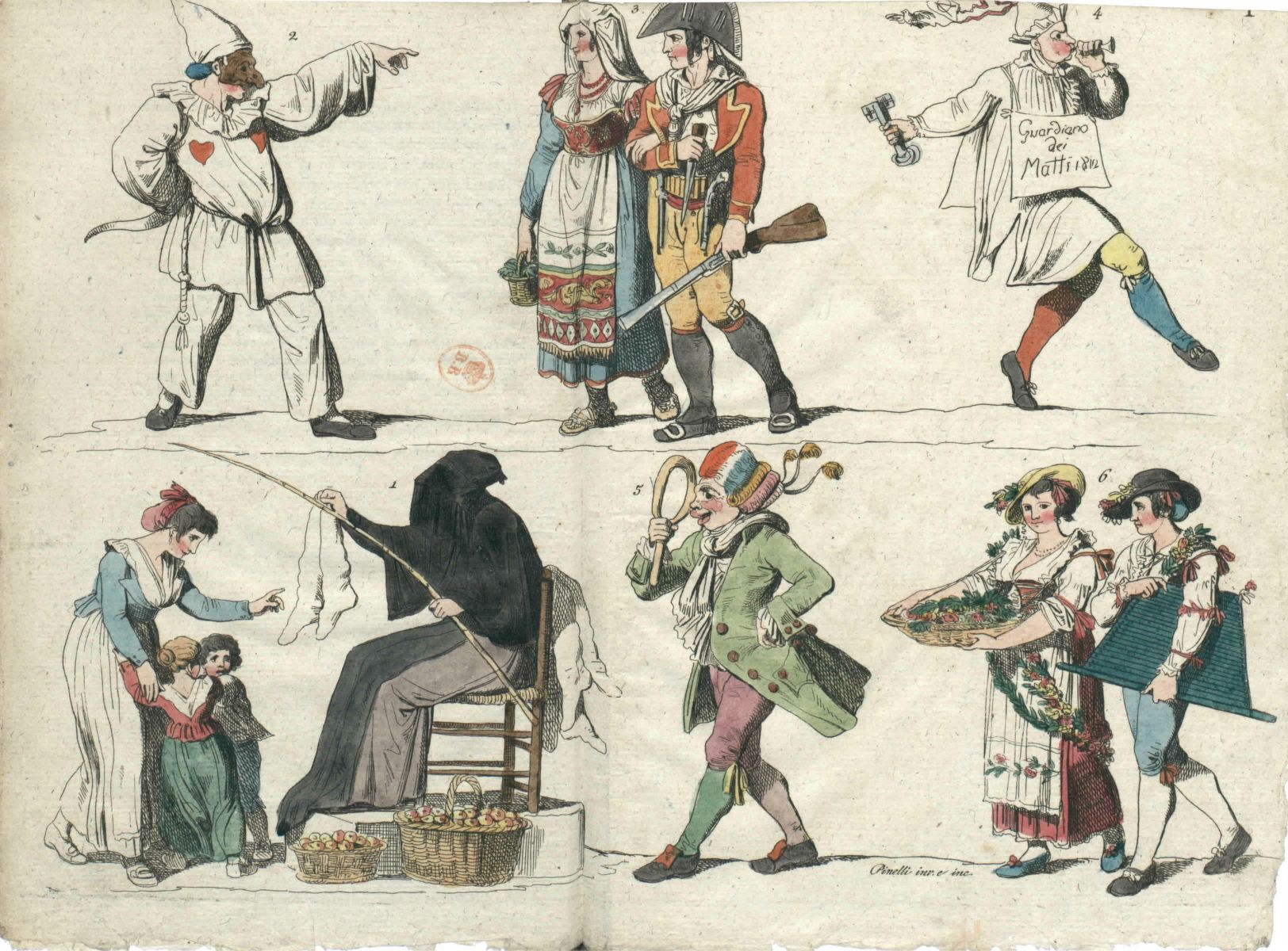 Figures du Carnaval de Rome - 1812.